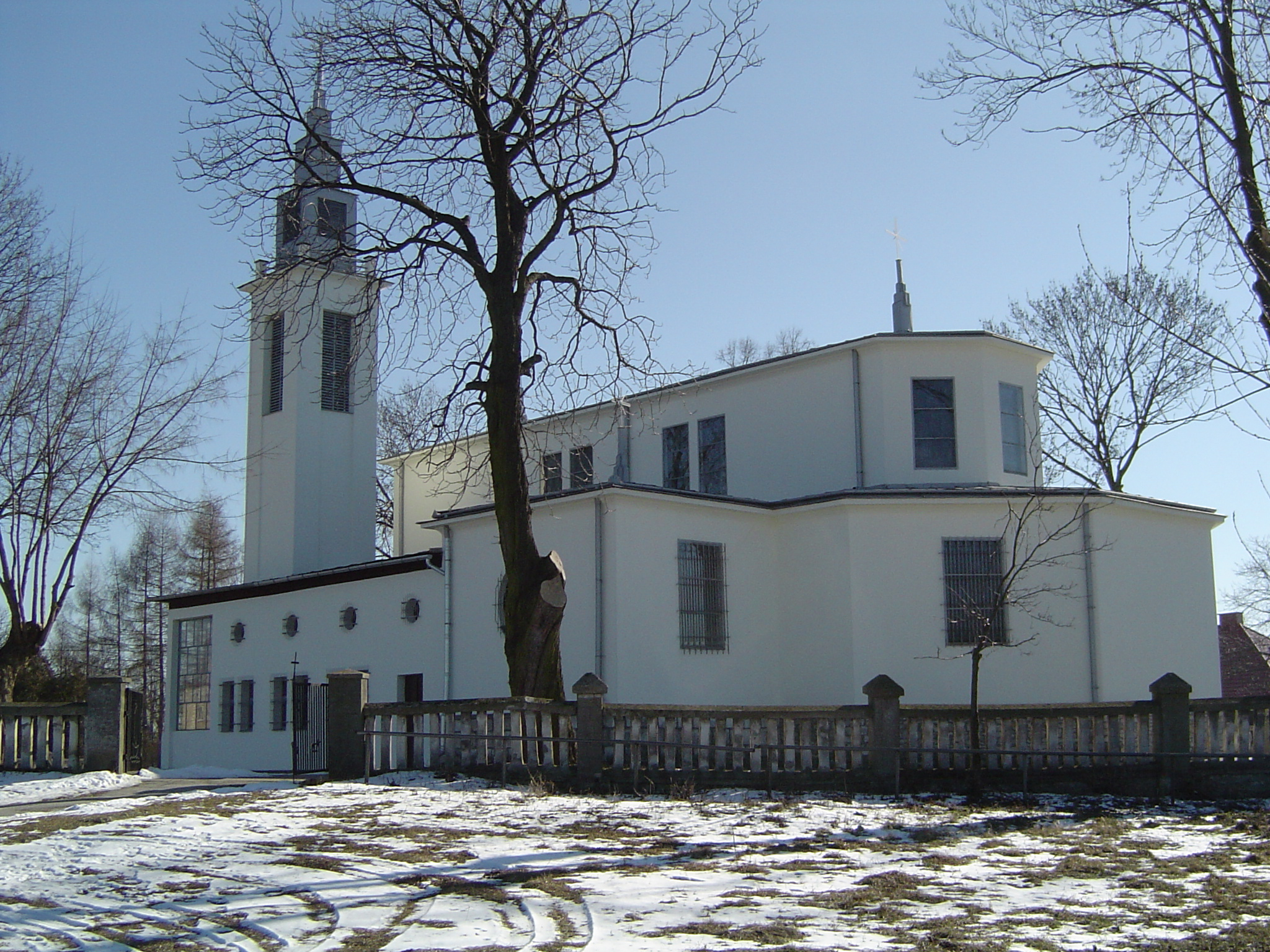 Kościół św. Mikołaja w Solcu Zdrój